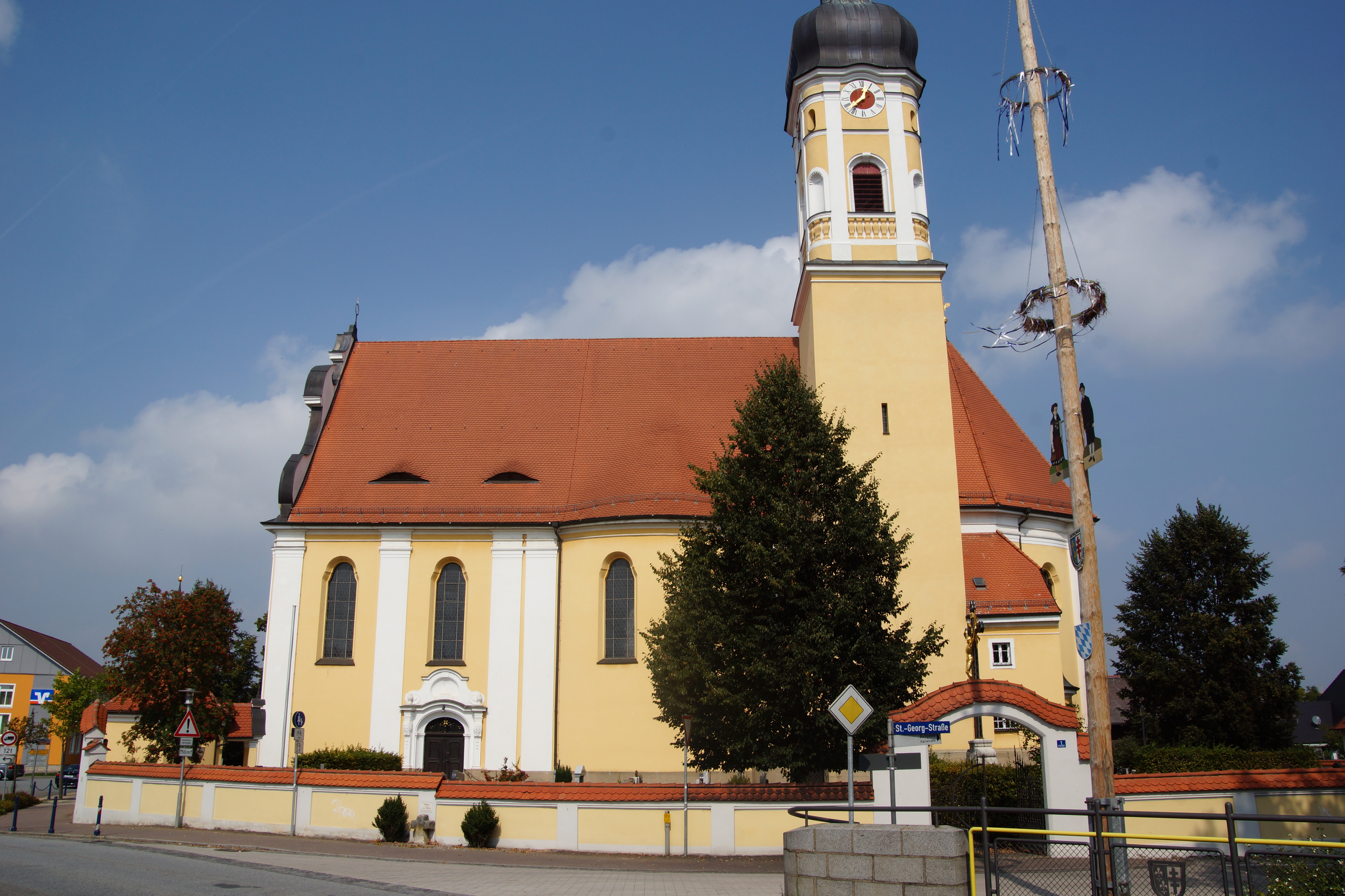 Die katholische Pfarrkirche St. Georg in Obertraubling bei Regensburg